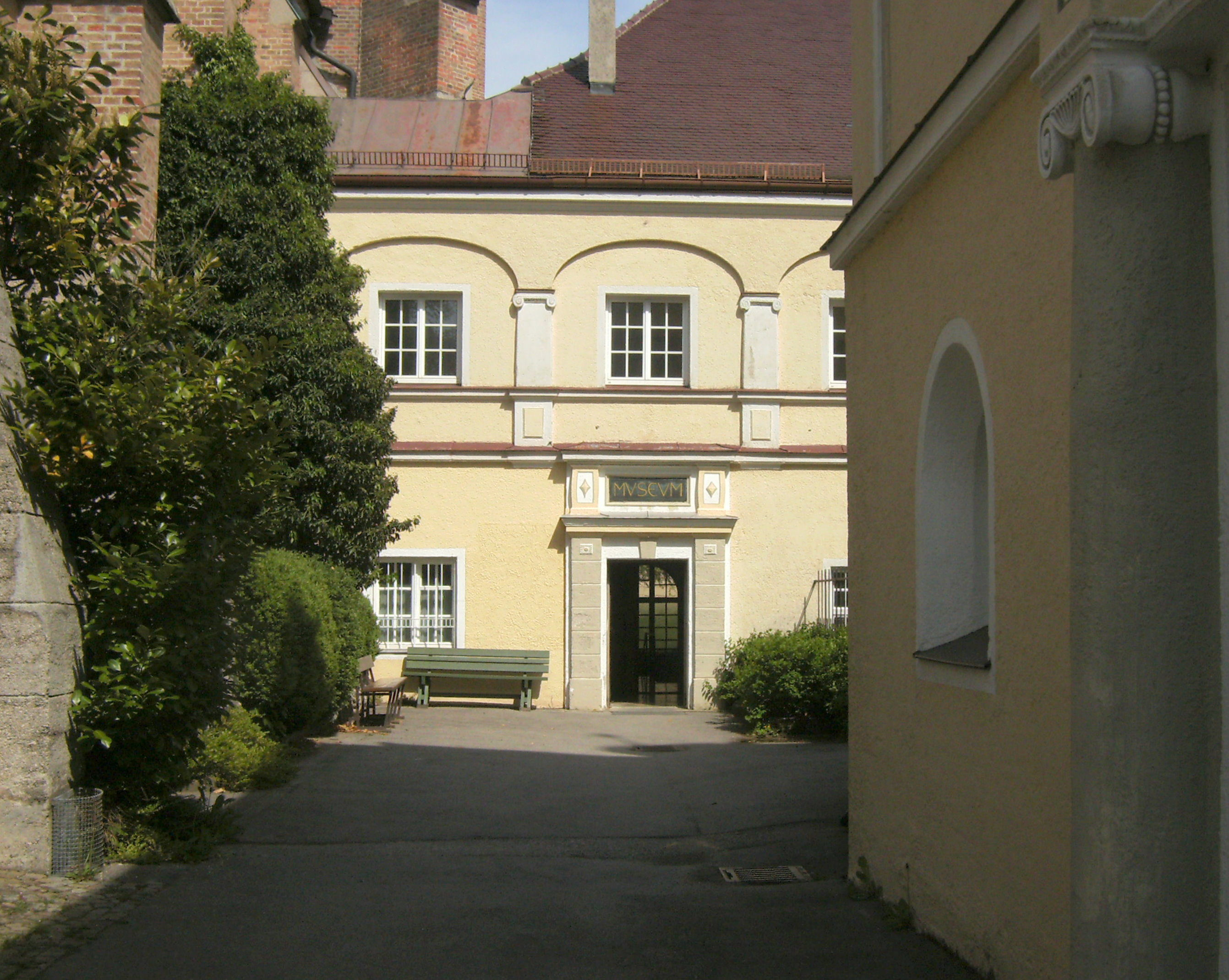 Missions-Museum St. Ottilien - Eingang